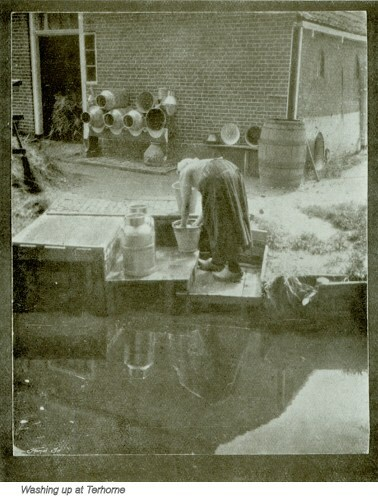 Het reinigen van melkgerei op de boenstap bij een boerderij in Terhorne